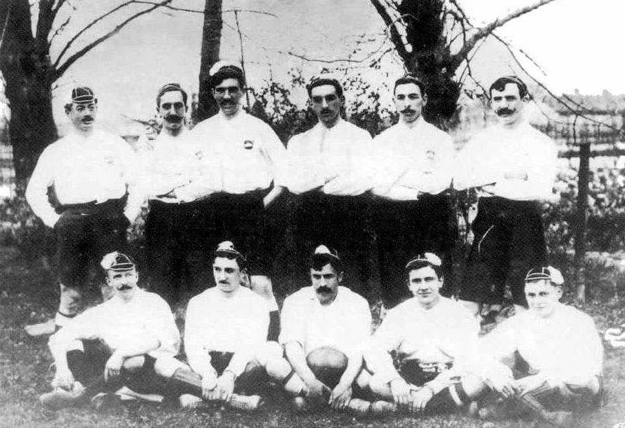 Formación del Club Bizcaya, ganador de la primera edición de la Copa del Rey en 1902.